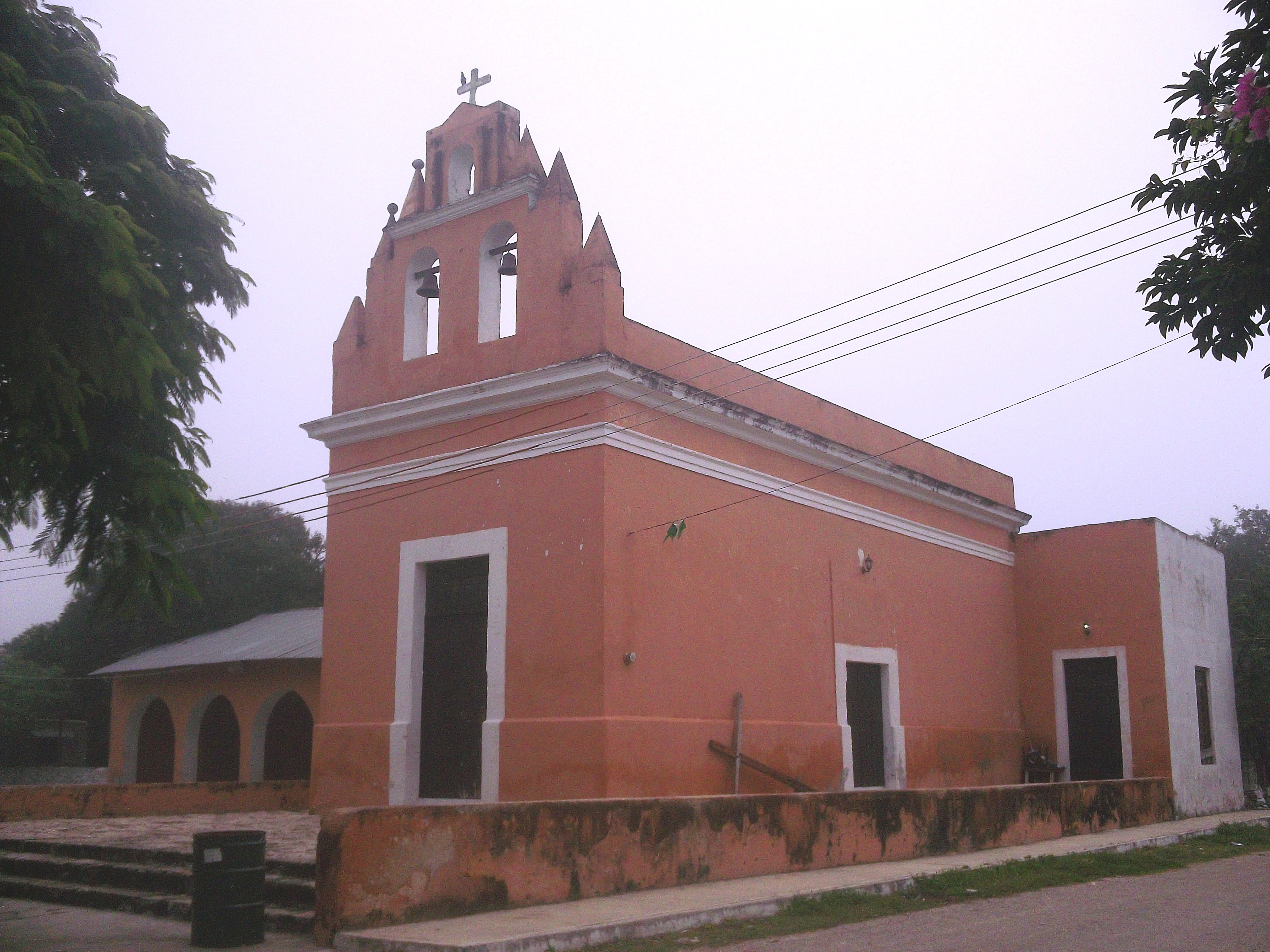 Iglesia de Ticimul (Umán), Yucatán.